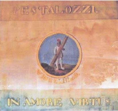 Fahne Cadettencorps am Institut von Pestalozzi in Yverdon mit der Überschrift „Pestalozzi“ oben, Winkelried als Emblem in der Mitte und unten dem Motto „in amore virtus“ (lat.: „die Macht der Liebe“).